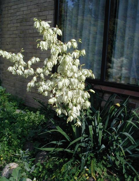 Yucca filamentosa